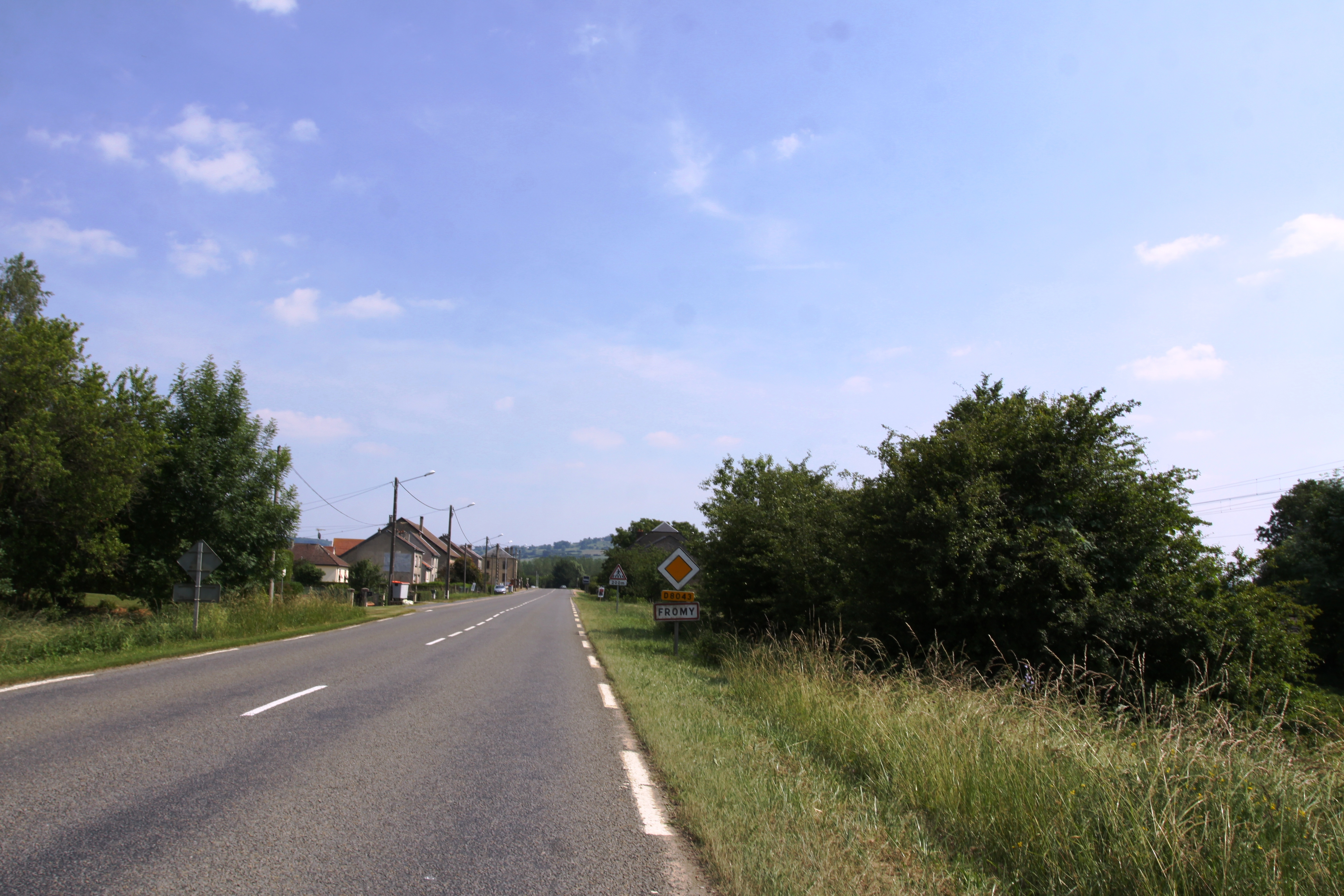 Village Ardennais